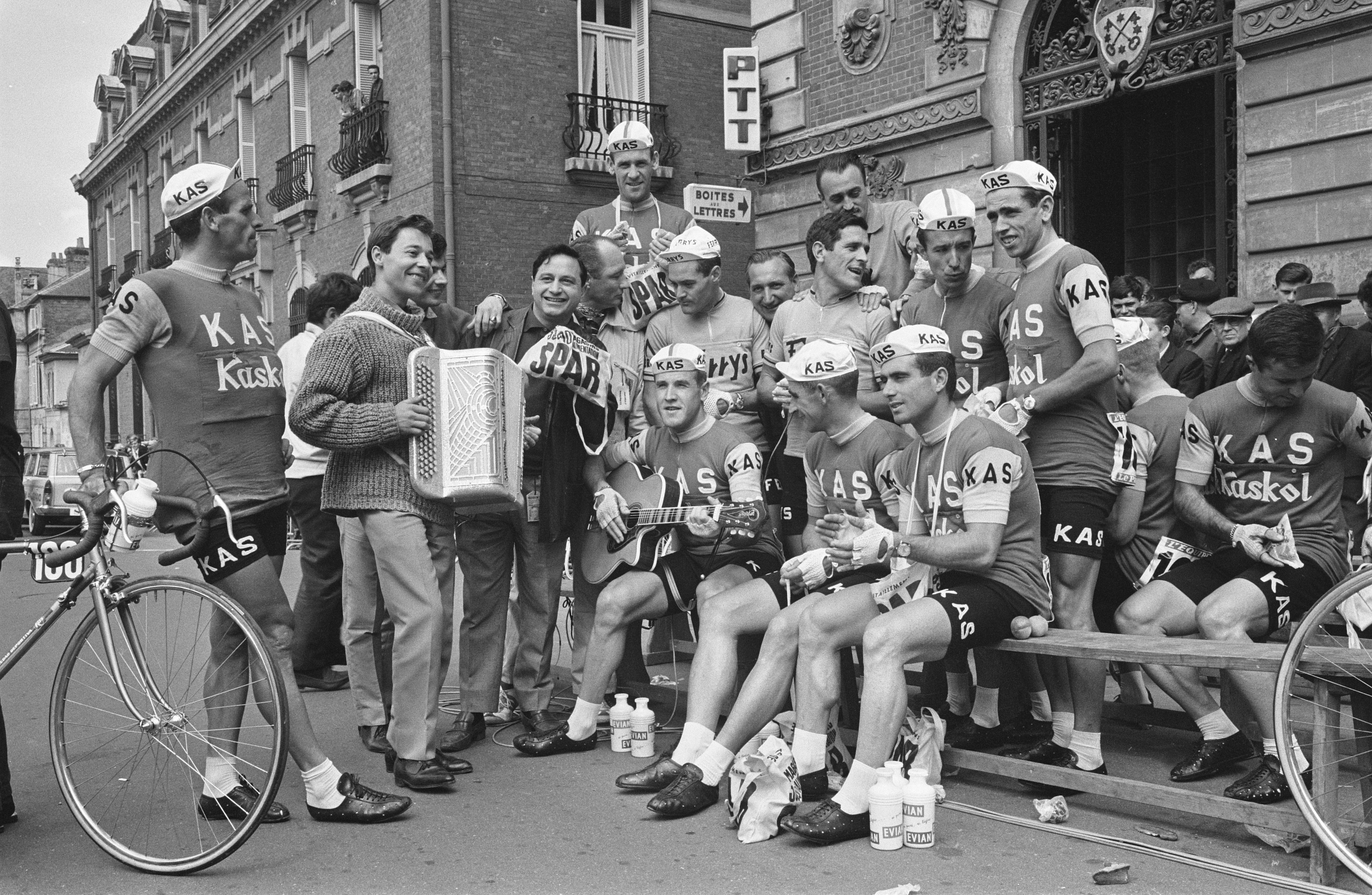 51ste Tour de France 1964. Twee Spaanse ploegen maken muziek.